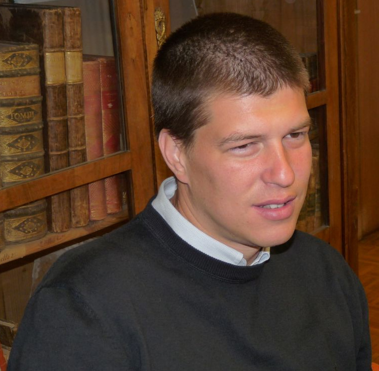 Goran Vojnović